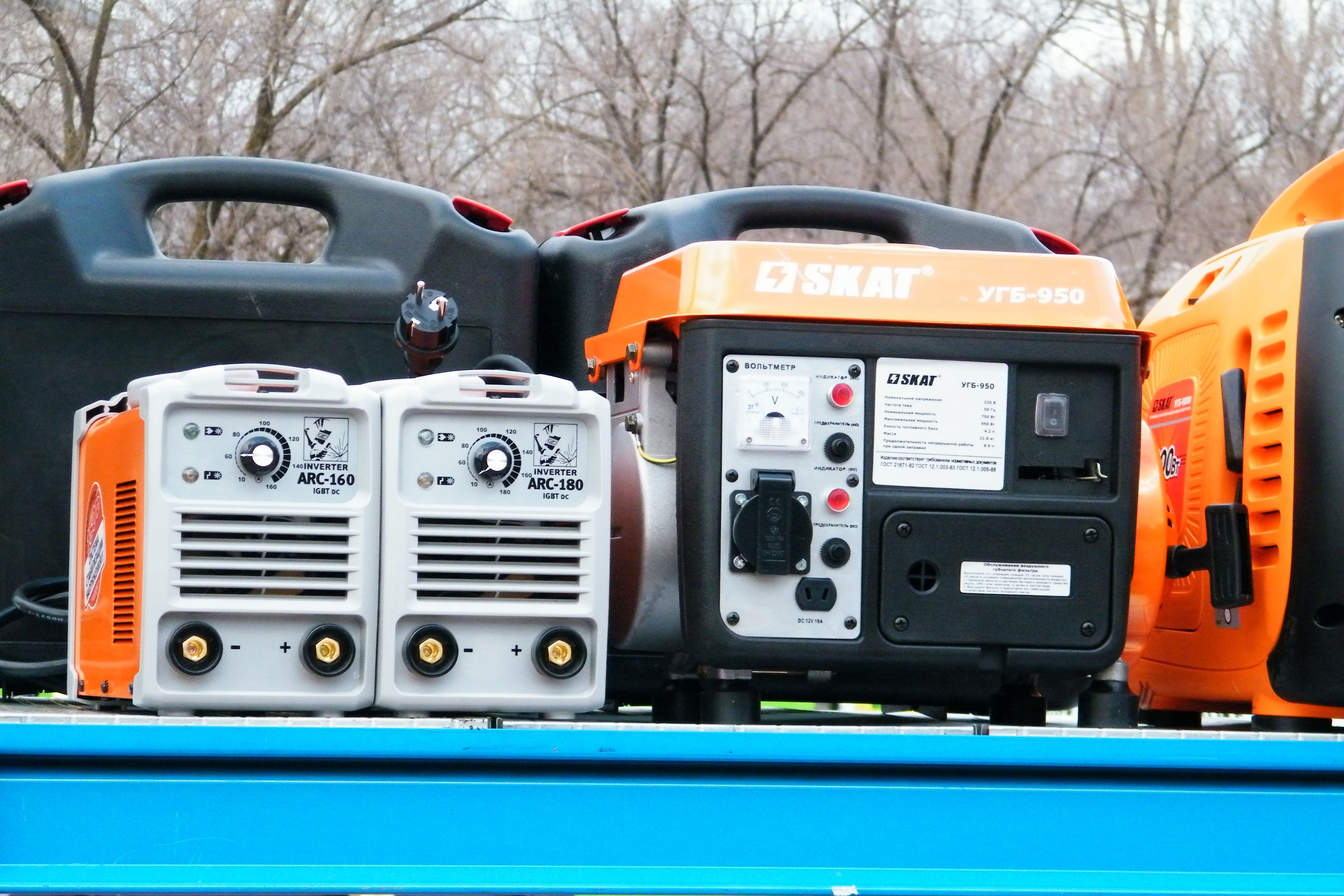 Engine-generators